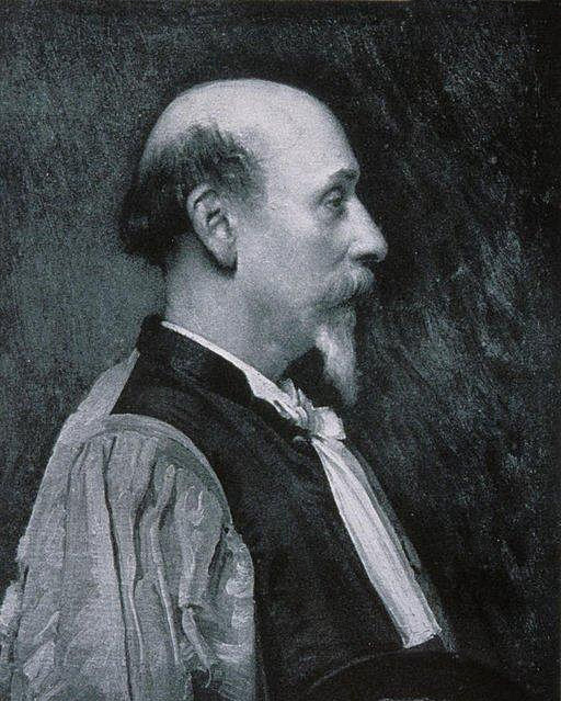 Louis-Auguste Himly. 1906. Bibliothèque nationale et universitaire de Strasbourg